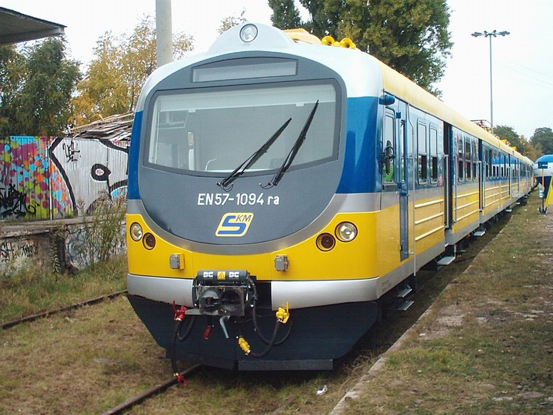 Elektryczny zespół trakcyjny EN57-1094, zmodernizowany przez ZNTK Mińsk Mazowiecki dla SKM Trójmiasto, podczas prezentacji na targach Trako 2007 w Gdańsku.